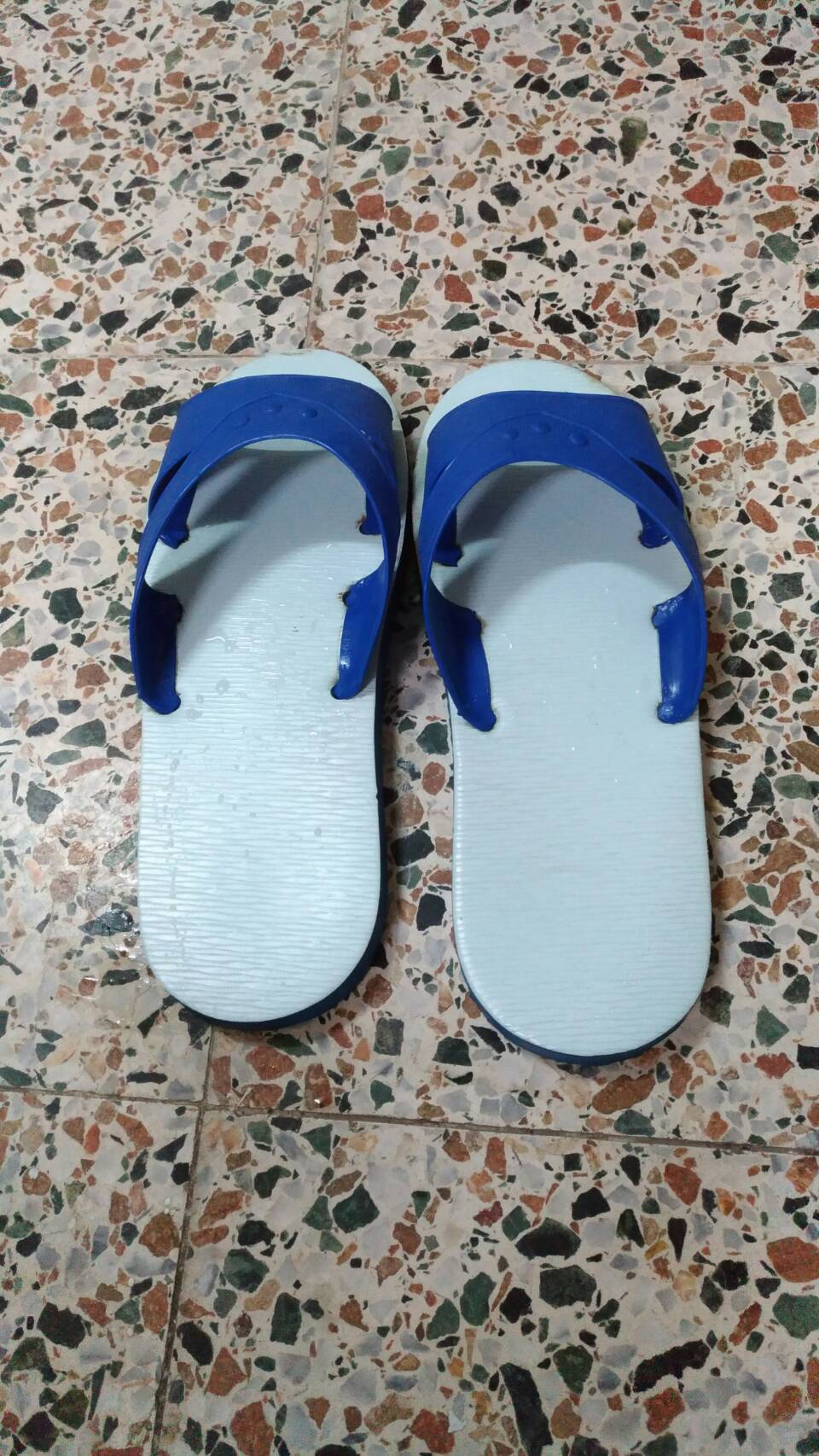 常見到不行的藍白拖